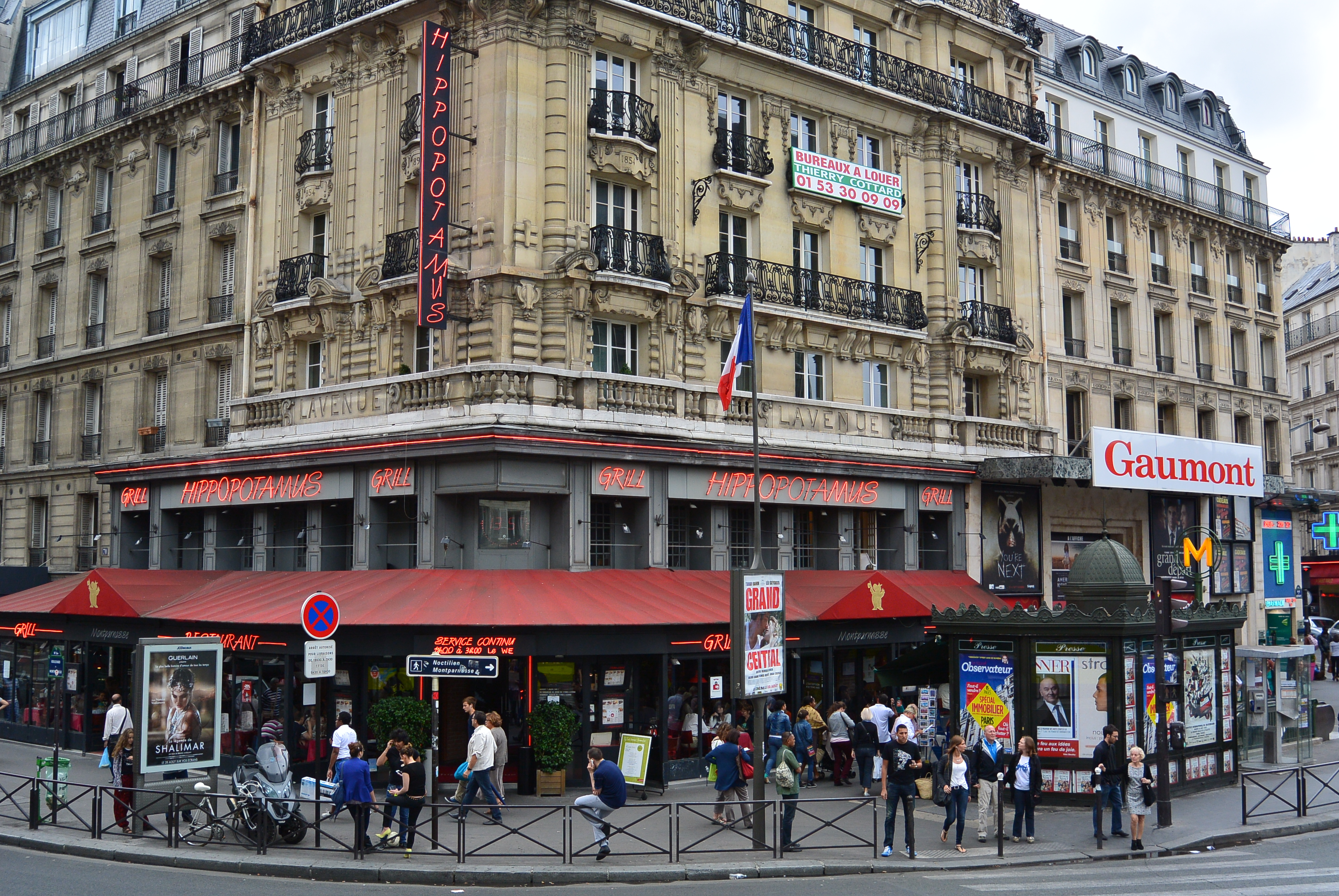 Hippopotamus, 68 Boulevard du Montparnasse, 75014 Paris, France.